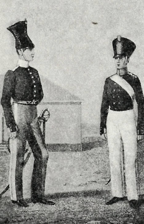 Военные кантонисты учебных эскадронов уланских и учебных батальонов поселенных полков, 1821—1825 гг. Это изображение было использовано для иллюстрирования статьи «Кантонисты военные» опубликованной в двенадцатом томе «Военной энциклопедии», который был издан книгоиздательским товариществом И. Д. Сытина в 1913 году в столице Российской империи городе Санкт-Петербурге.